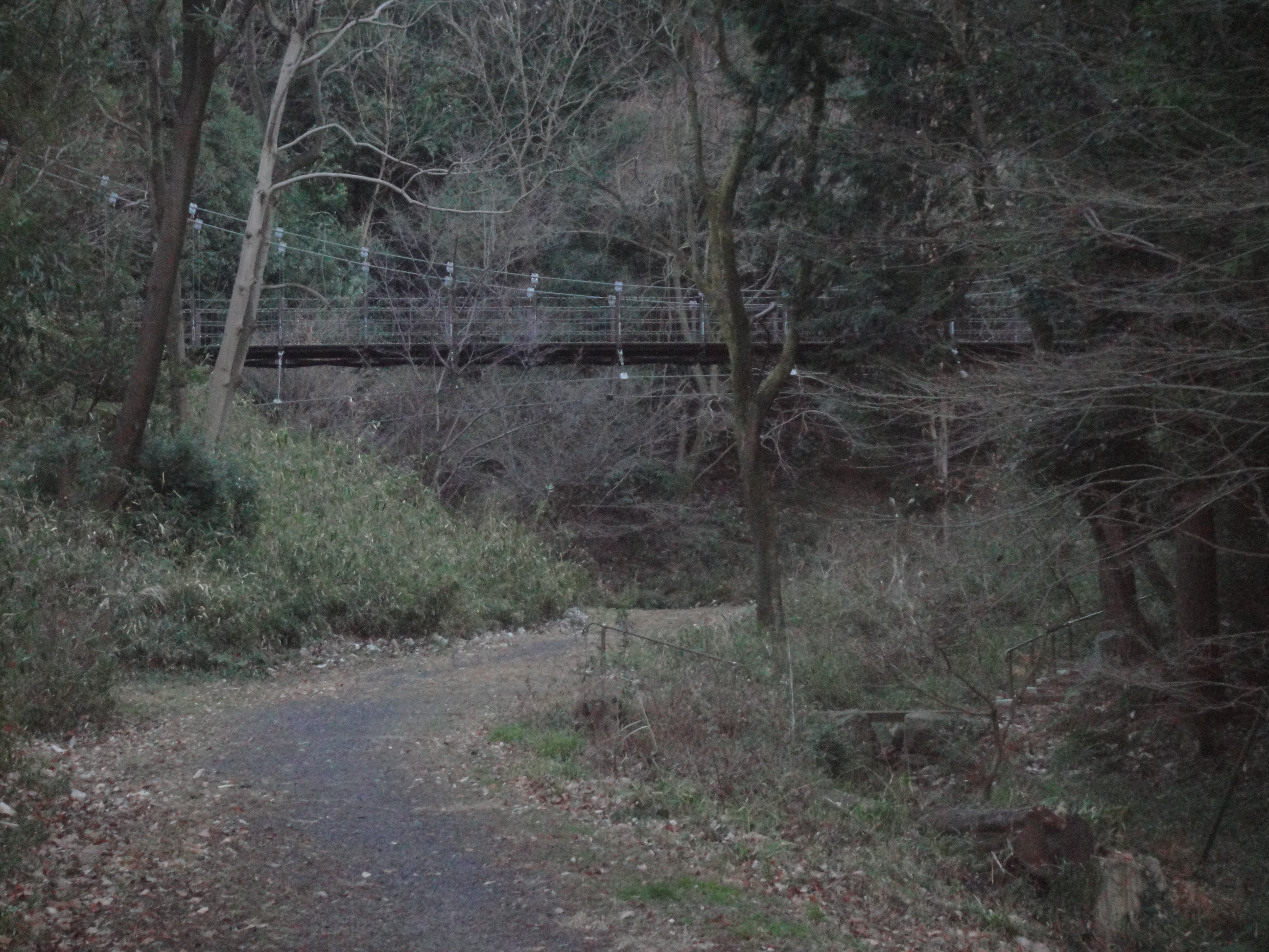 蓮生寺公園